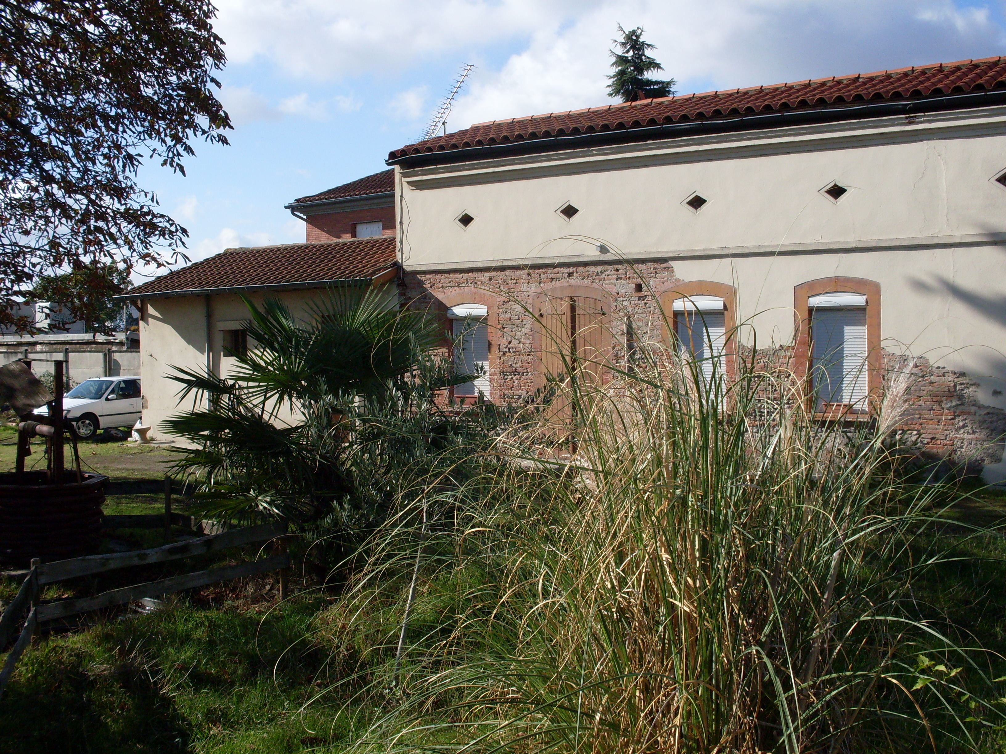 Ancienne maison maraîchère, impasse de la Glacière. Sur la gauche on peut reconnaître le puits.